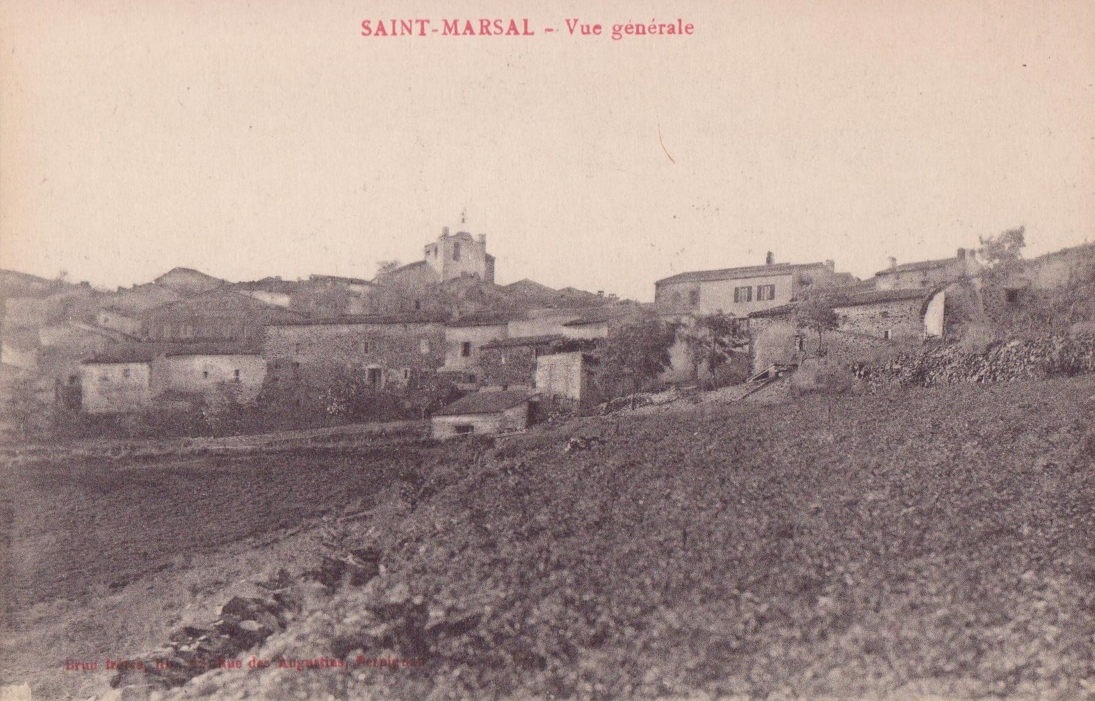 Vue générale de Saint-Marsal